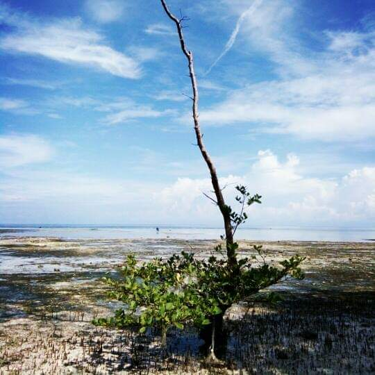 Pemandangan bakau di Sore hari di Pulau Owi kabupaten Biak Numfor Propinsi